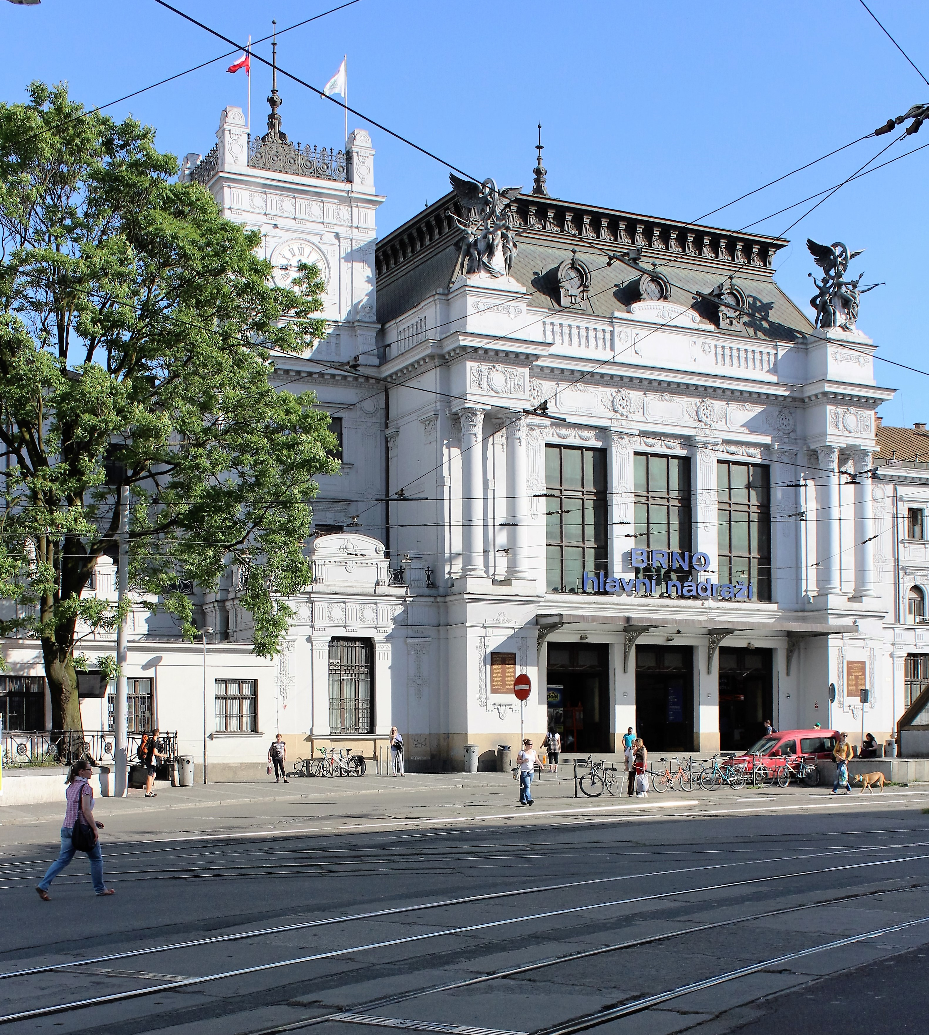 Brno hlavní nádraží - průčelí vstupní haly